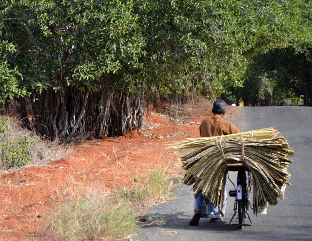 திசையன்விளைக்கருகே தேரிக்காட்டில் பனைபொருள்களை விற்பனைக்கு எடுத்துச்செல்லும் காட்சி